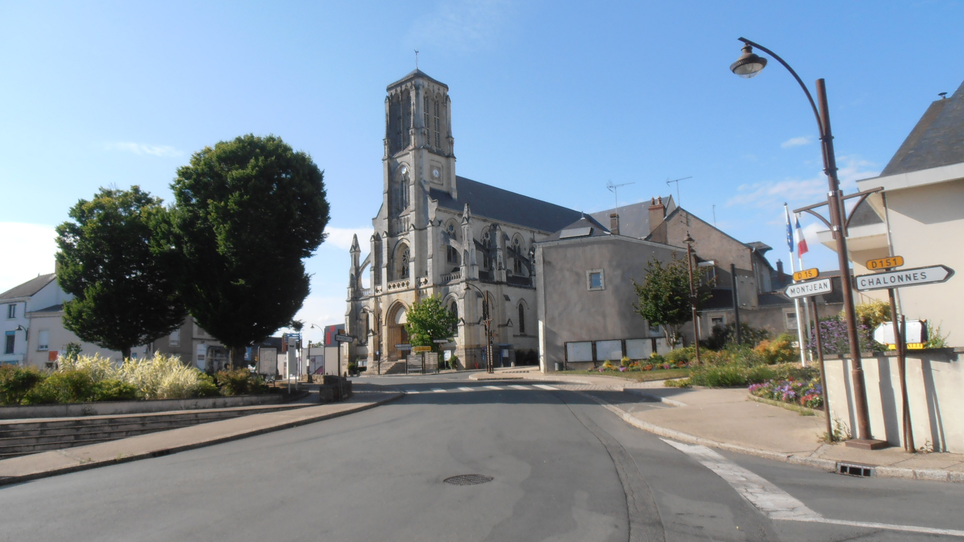 église de la pommeraye